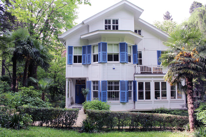 Nâzım Hikmet Kültür ve Sanat Araştırma Merkezi